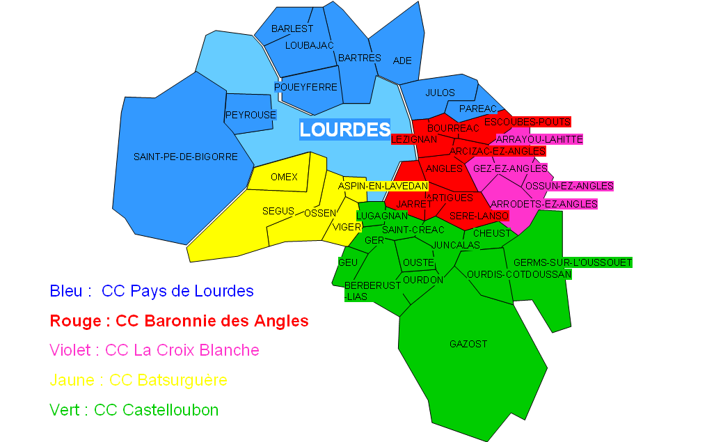 Pays de Lourdes et les communautés de communes en faisant partie